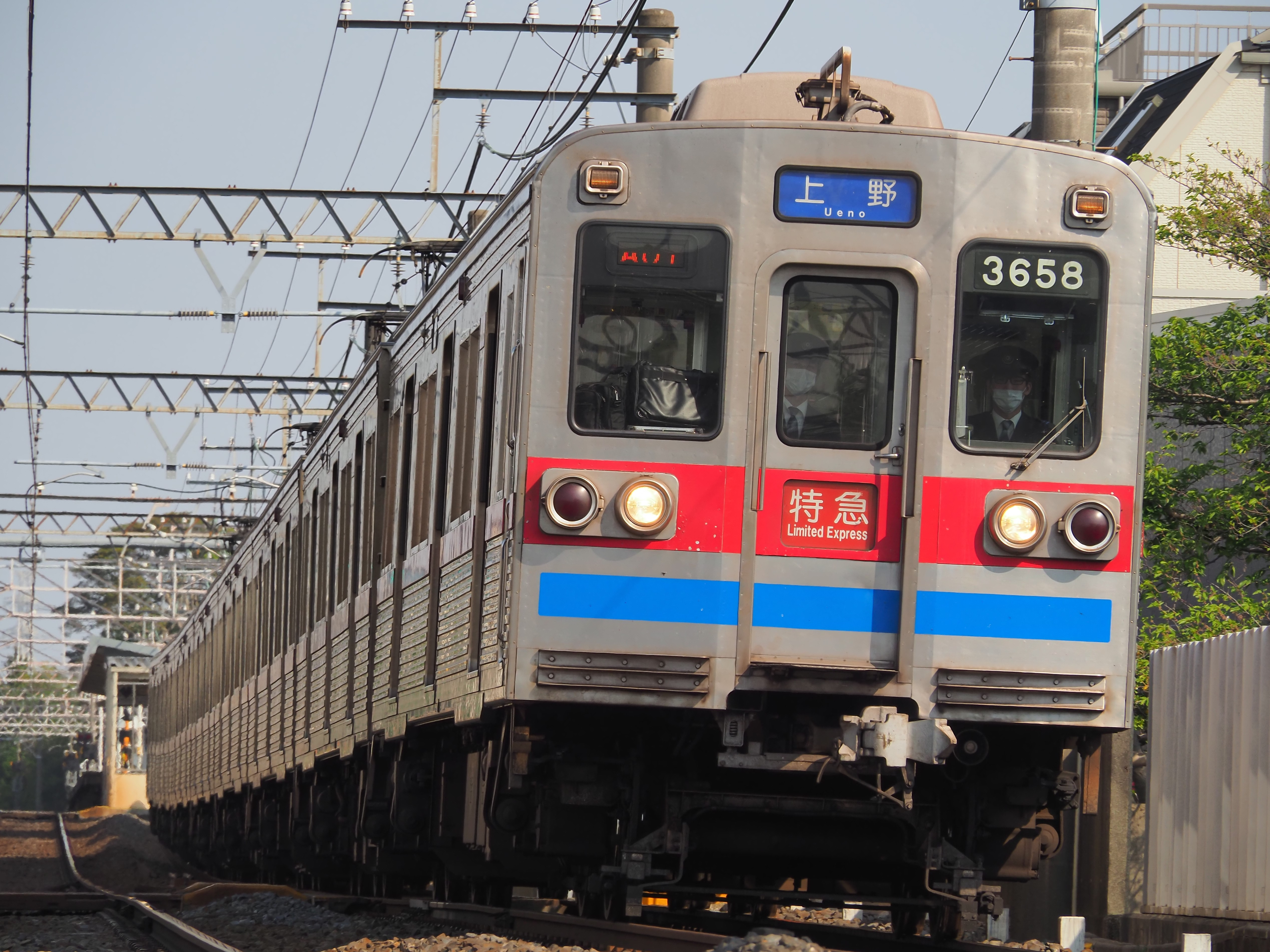 鬼越～京成八幡間を走行する京成3600形3658編成による特急京成上野行き